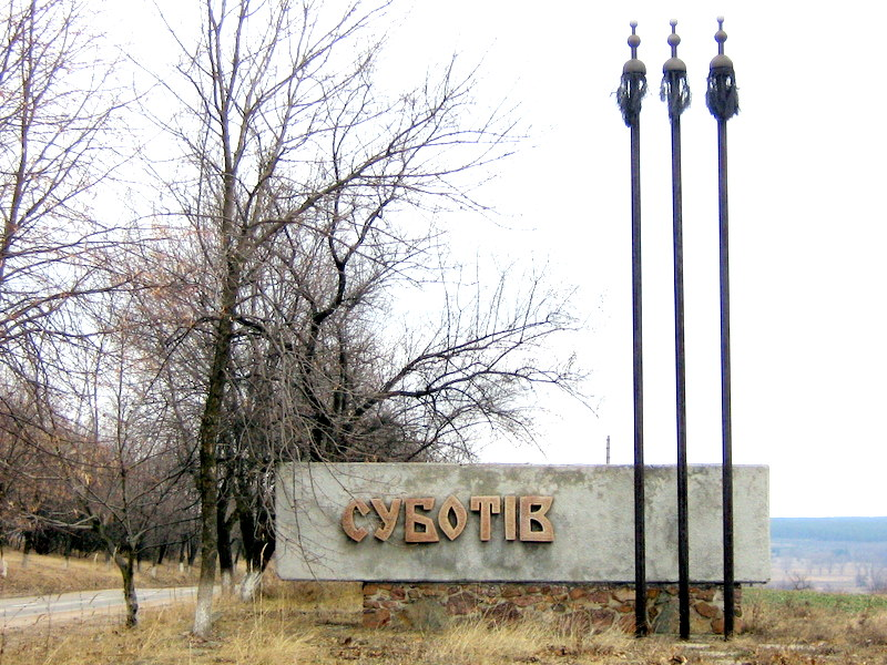 Subotiv, příjezd do města, Ukrajina